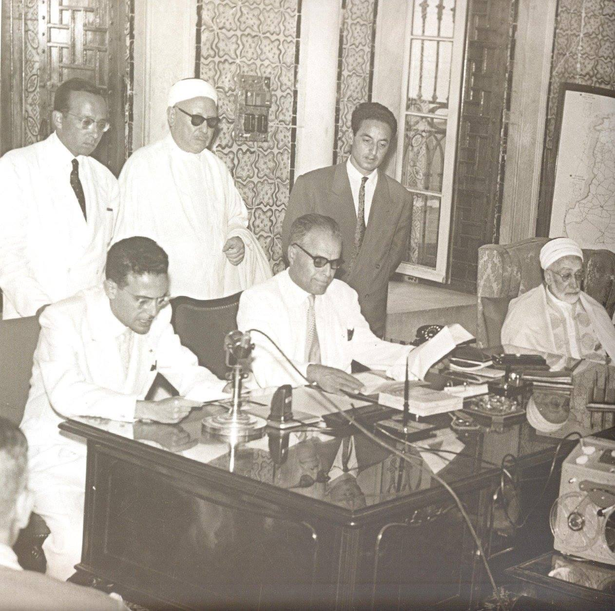 Jour de promulgation officielle du Code du Statut Personnel (CSP) tunisien. Ahmed Mestiri, ministre de la justice est assis à coté de Bourguiba. A droite de la photo est assis le cheikh Mohamed Tahar Ben Achour. En gris debout derrière Bourguiba, se dresse Abdallah Farhat. Dans cette réunion, la lecture du CSP fut donnée par cheikh Mohamed Tahar Ben Achour en présence aussi de quelques membres du gouvernement et aussi du cheikh Mohamed Abdelaziz Djaït (debout en jebba blanche).